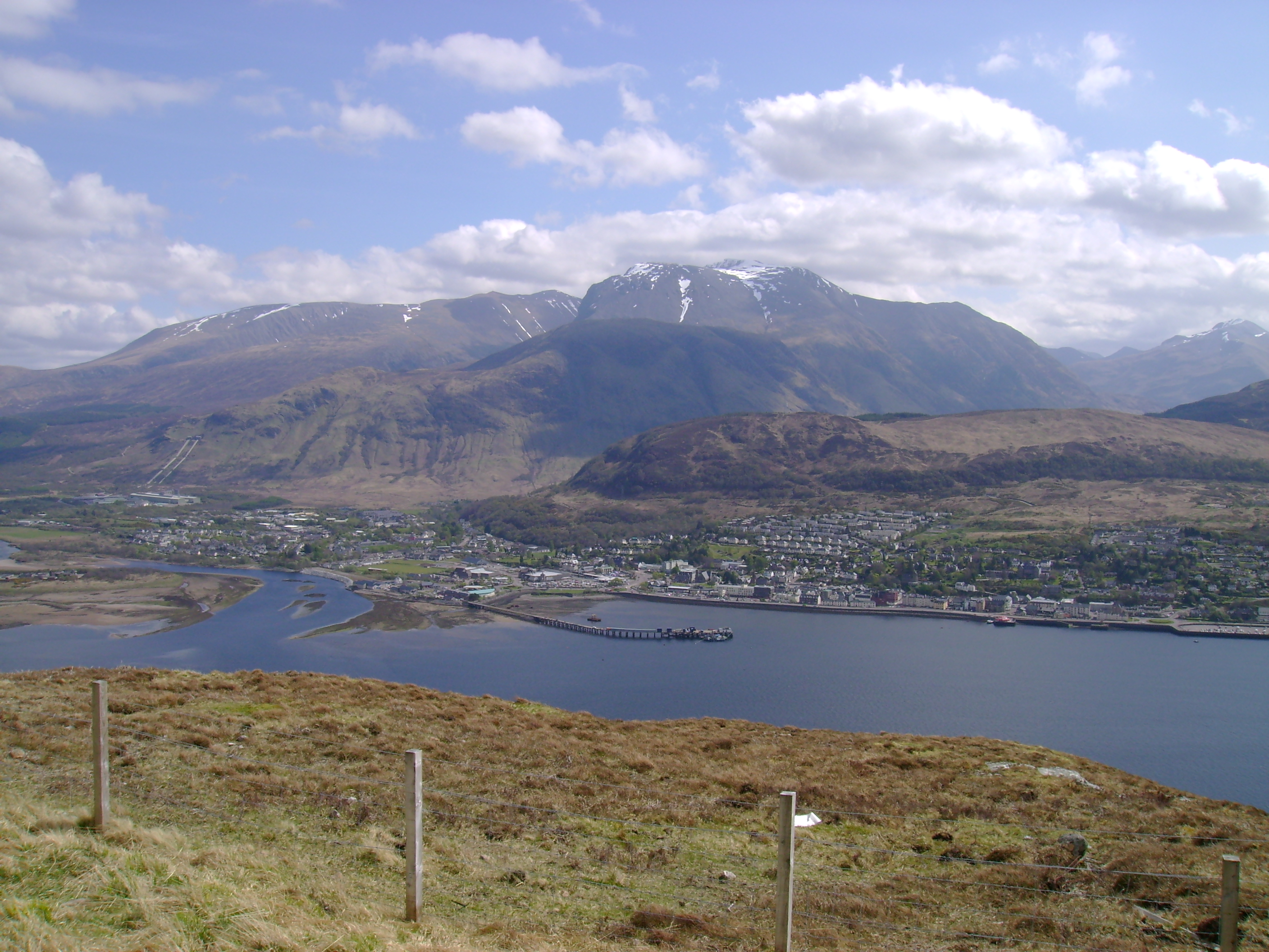 Ben Nevis